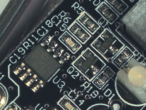 표면실장 부품